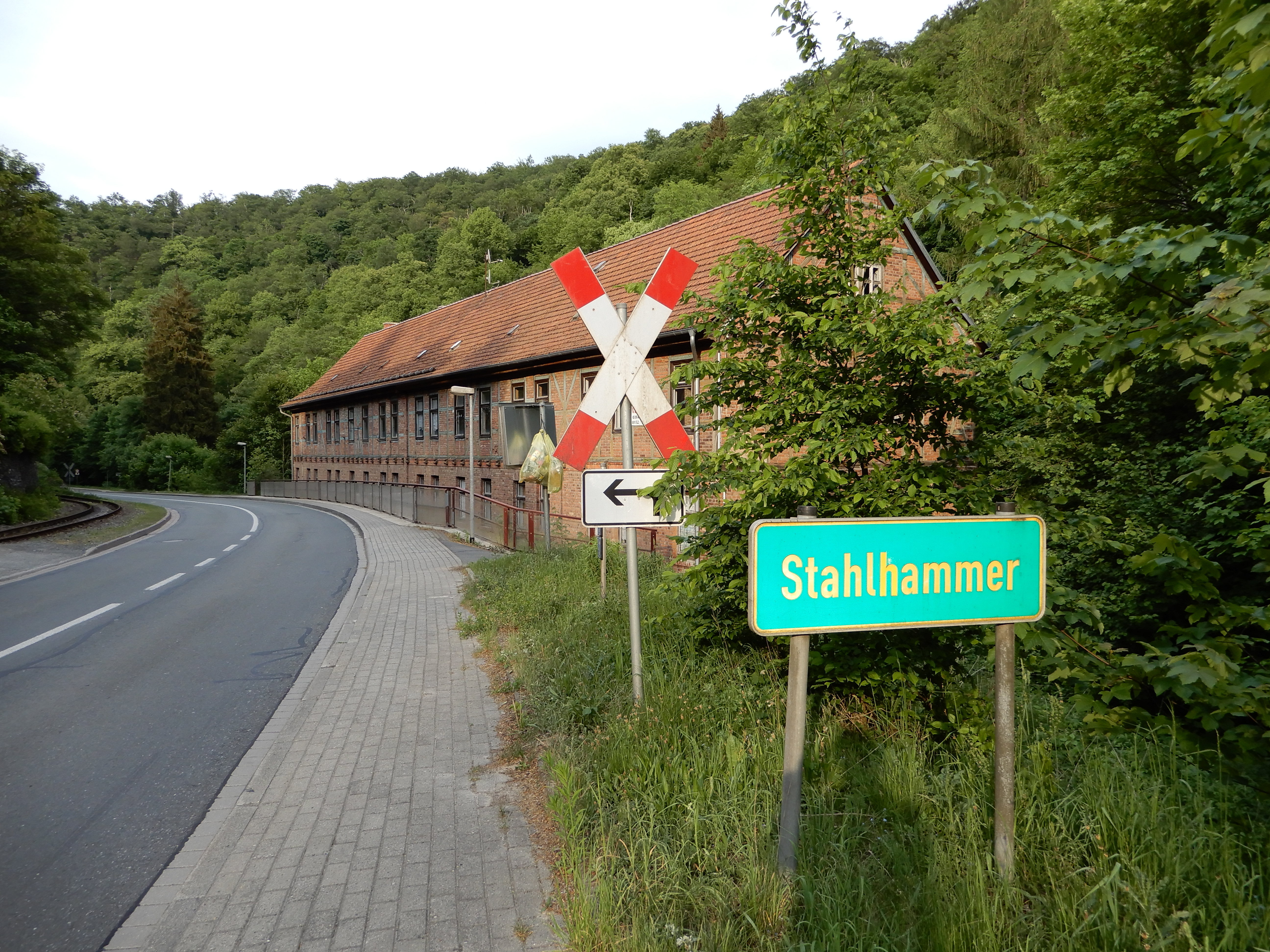 Ortsschild Stahlhammer an der B185